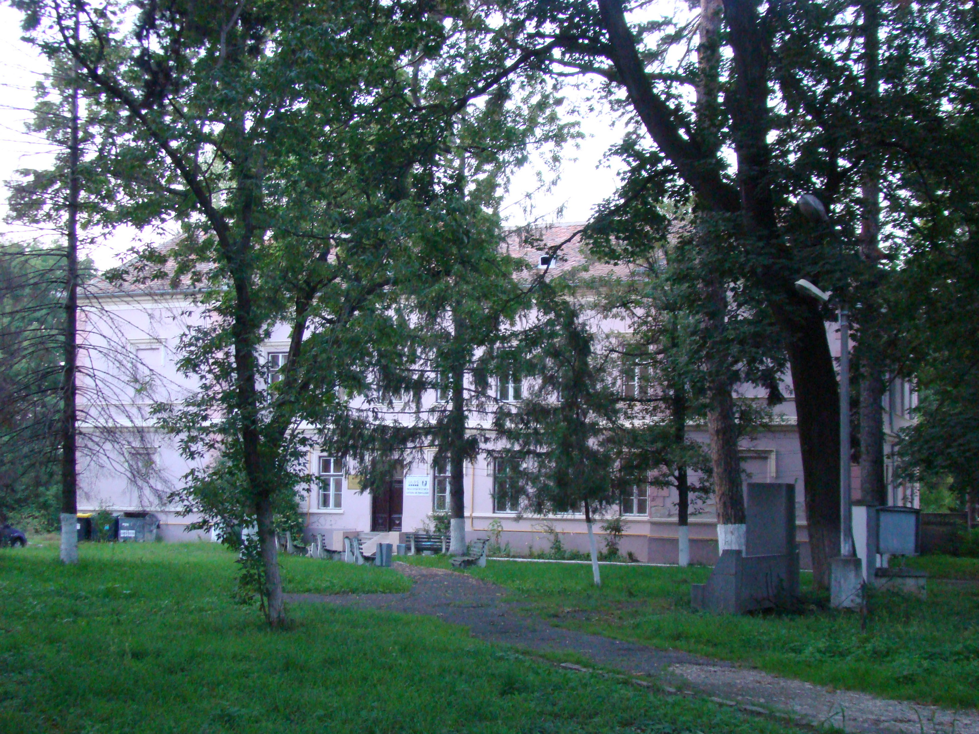 Ansamblul fostului seminar evanghelic din Sibiu (Corpul D) 04